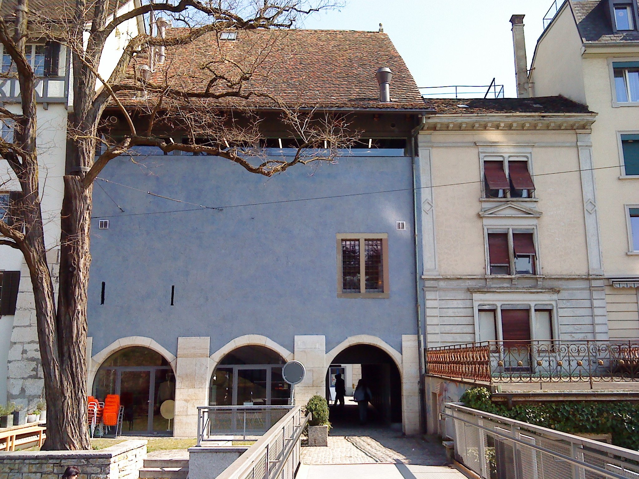 Das Haberhaus in Schaffhausen/Schweiz von der Grabenstrasse her gesehen.